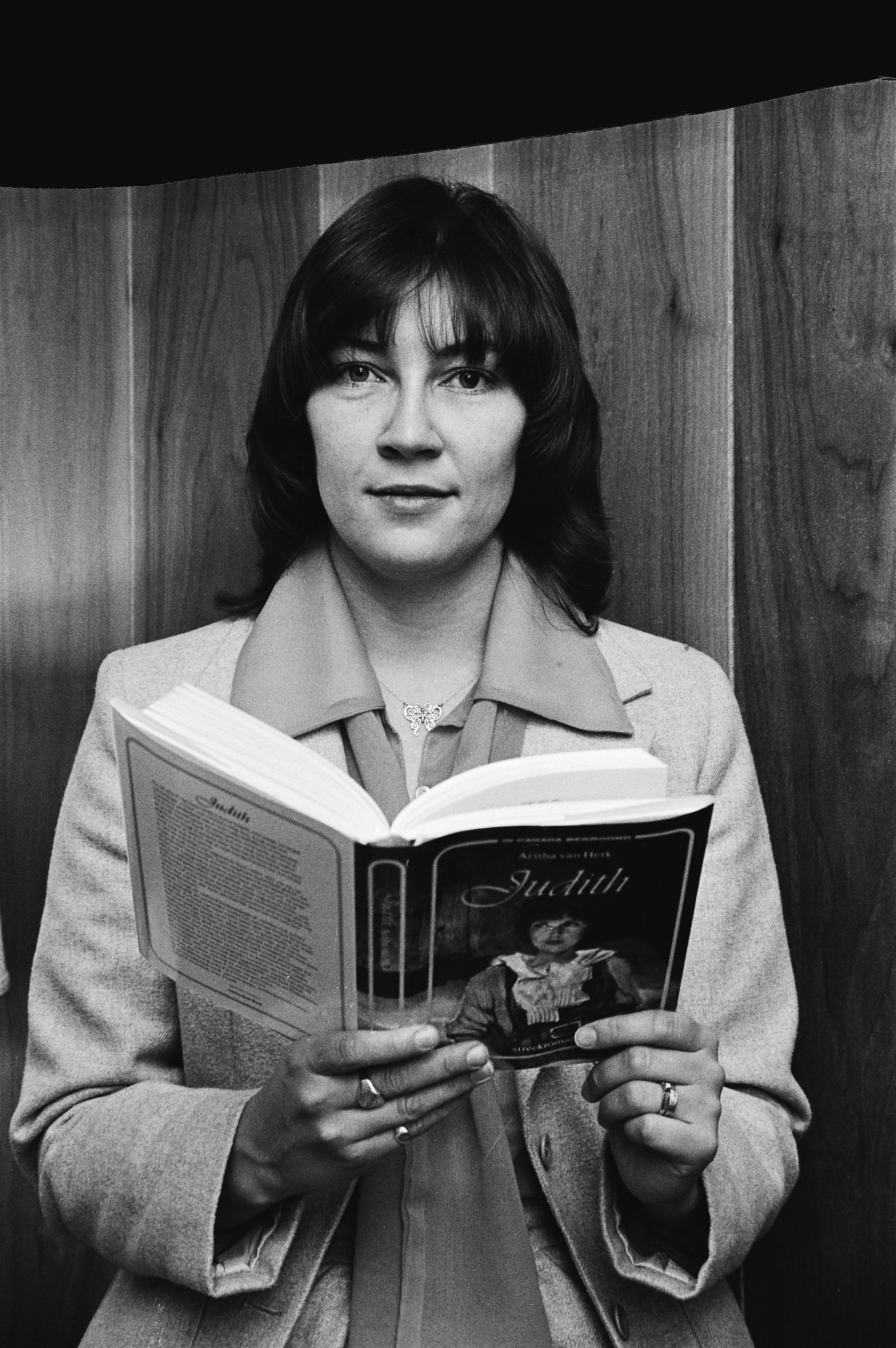 Collectie / Archief : Fotocollectie Anefo Reportage / Serie : De Canadese schrijfster Aritha van Herk Beschrijving : De Canadese schrijfster Aritha van Herk met haar streekroman "Judith" Datum : 31 oktober 1979 Trefwoorden : portretten, schrijvers, streekromans, vrouwen Persoonsnaam : Herk, Aritha van Fotograaf : Dijk, Hans van / Anefo Auteursrechthebbende : Nationaal Archief Materiaalsoort : Negatief (zwart/wit) Nummer archiefinventaris : bekijk toegang 2.24.01.05 Bestanddeelnummer : 930-5192